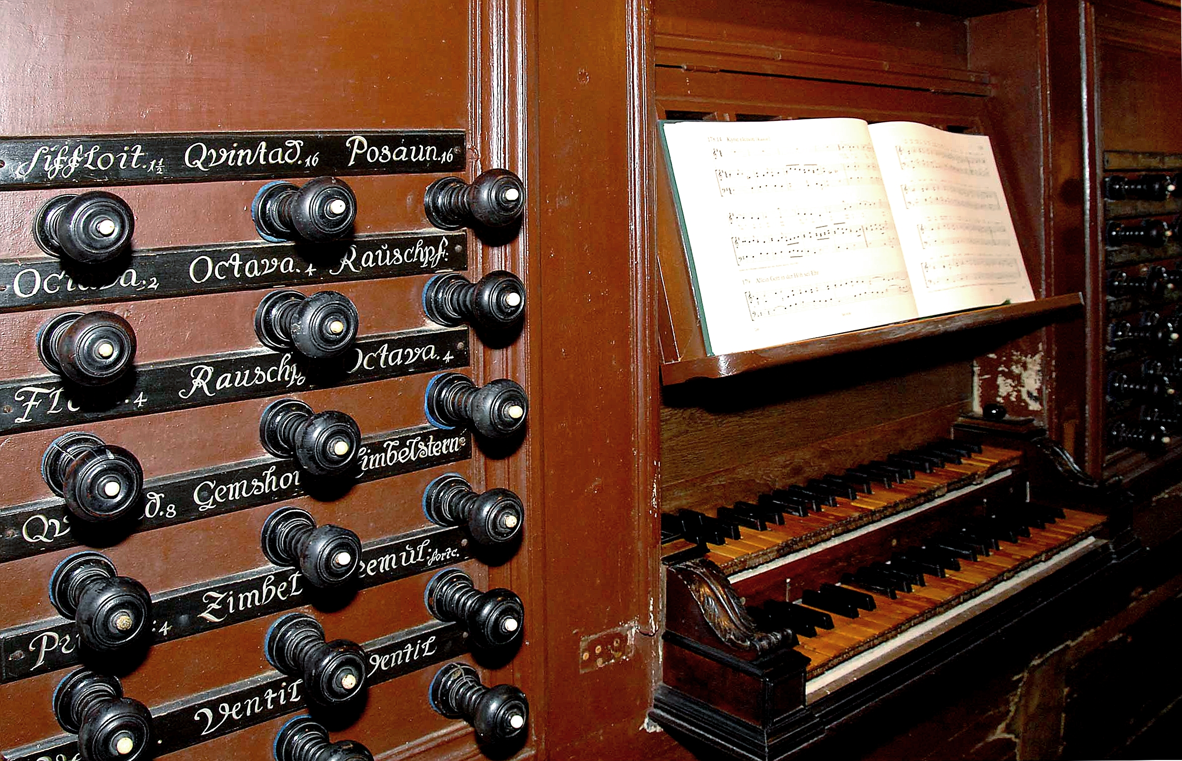 Schnitger Organ Cappel